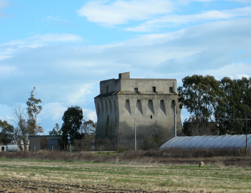 Torre Rivoli